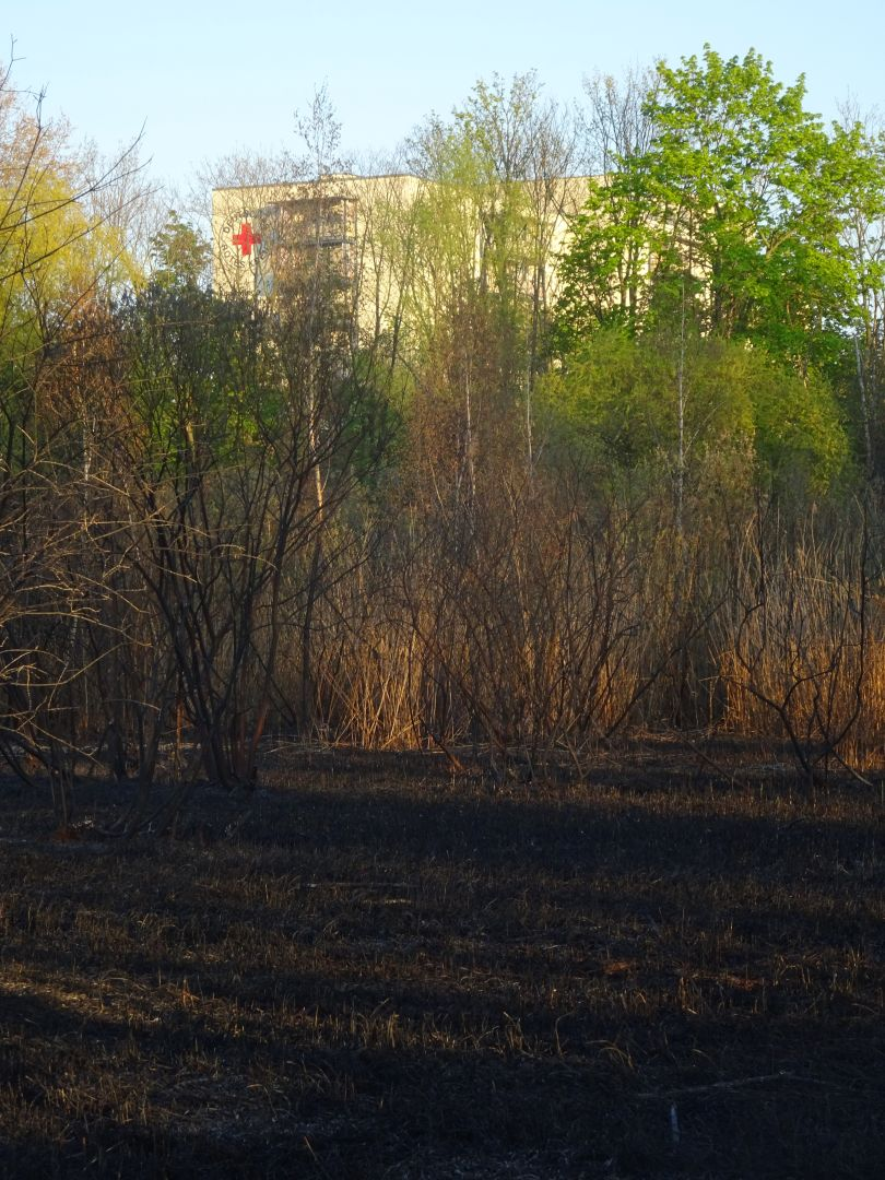 Spuren des Waldbrandes am 21. April 2020 in Leipzig-Schönau, im Hintergrund die DRK-Servicewohnanlage Grünauer Allee 61